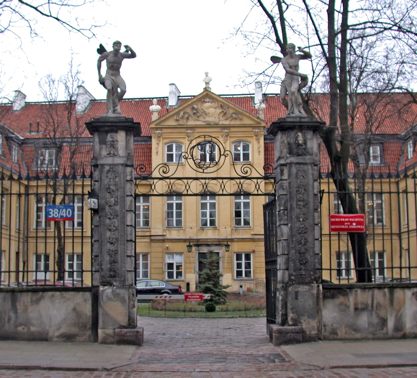 Varsavia, Palazzo dei Quattro Venti (Pałac Pod Czterema Wiatrami) su via Długa.